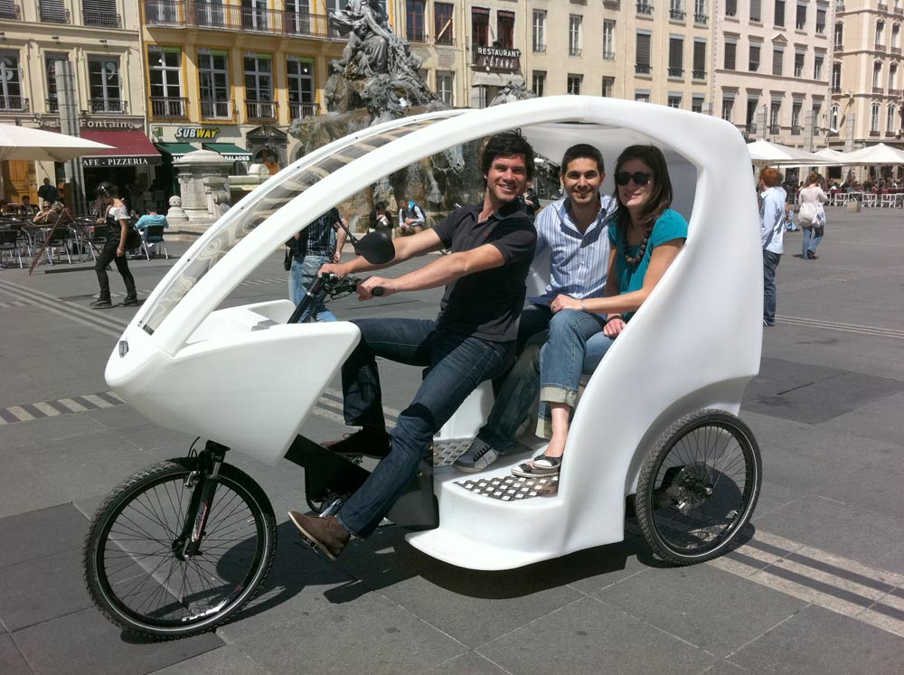 Vélotaxi dans le centre ville de Lyon